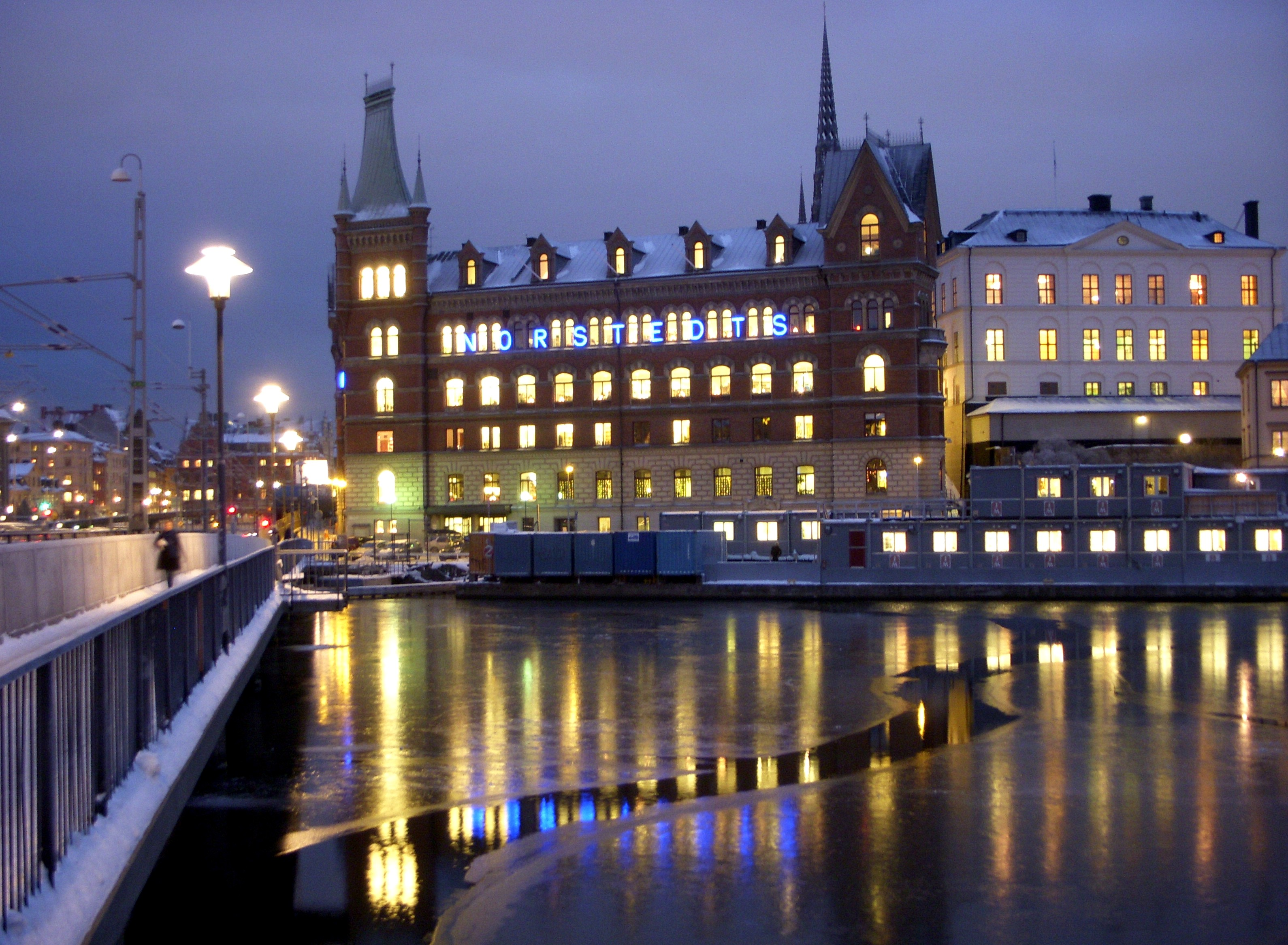 Norstedts förlag, Riddarholmen, Stockholm